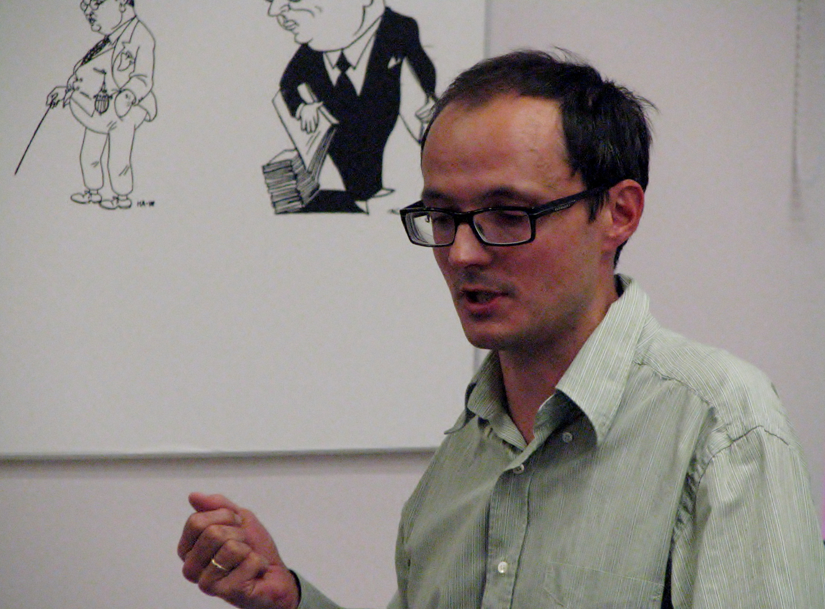 Daniele Monticelli esinemas Mihhail Lotmanile pühendatud sümpoosionil